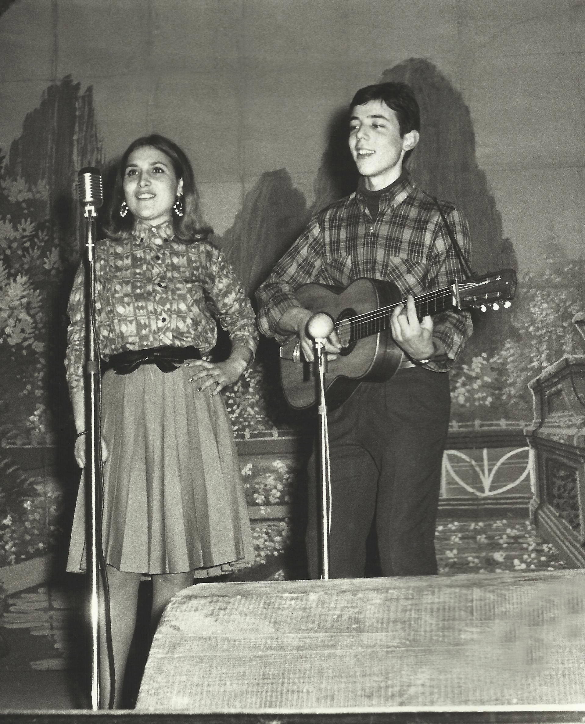 Remigi Palmero i Ruà és un cantant i guitarrista valencià. Fotografia d'Ismael Latorre Mendoza, del 12-02-1967, actuant amb Fina. Escenari del Teatre Moderno d'Alginet. Aquesta imatge va ser publicada en: Fornés, Alberto; Císcar, José i Latorre, Ismael: Alginet, històries, costums i altres relats, Societat Cultural Alèdua, Alginet, 2003. Dipòsit Legal: V-2546-2003, pàgina 118.